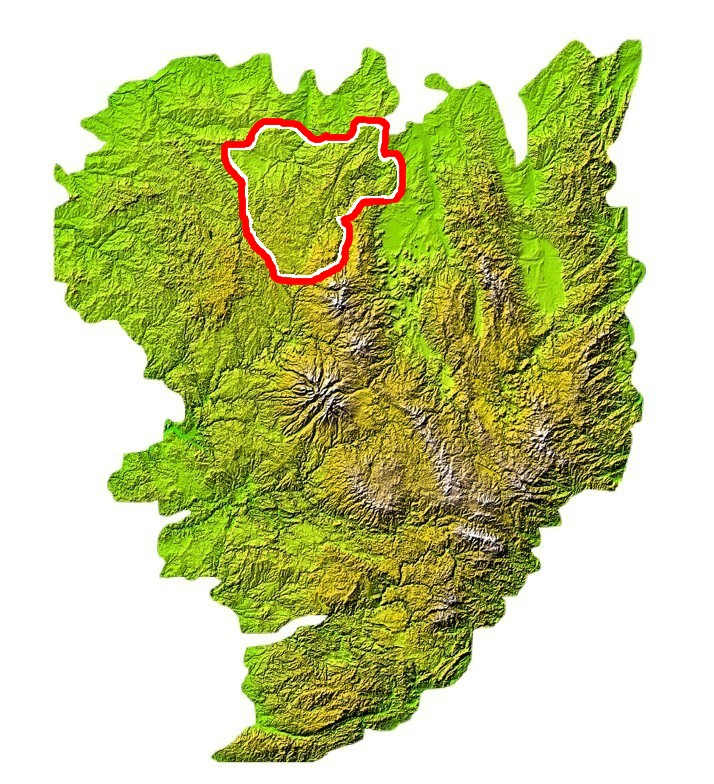 Situation des Combrailles (auvergnate et limousine) sur la carte du Massif central